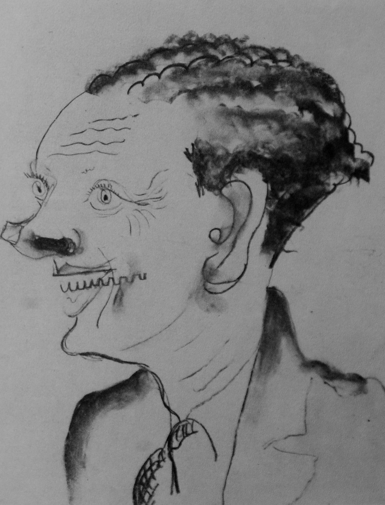 Jerk Werkmäster. Karikatyrteckning av konstnärsvänner utförd av konstnären John Jon-And, utgiven postumt efter hans död 1941 i boken Konstnärer Gebers Förlag.